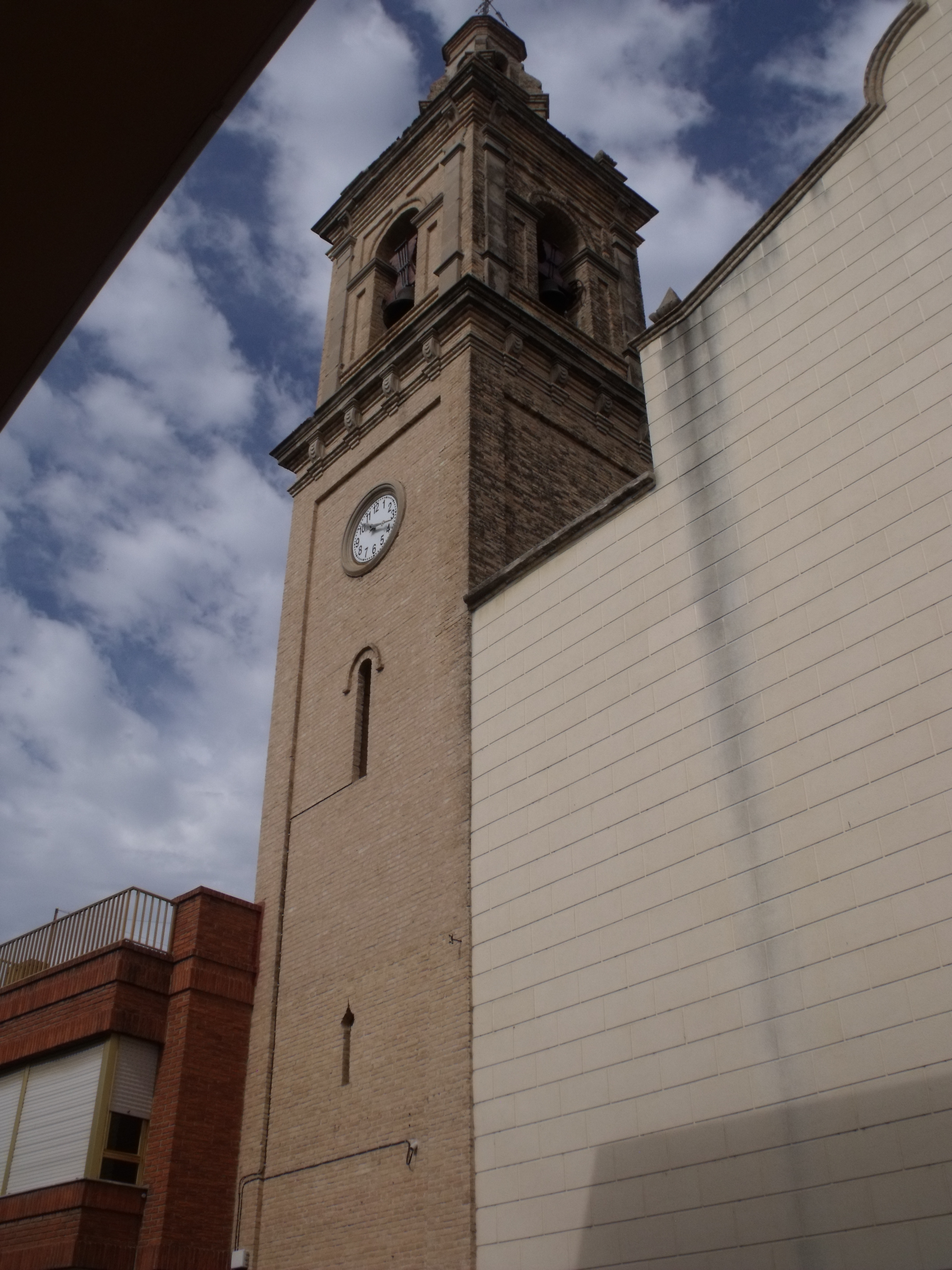 Detalle campanario